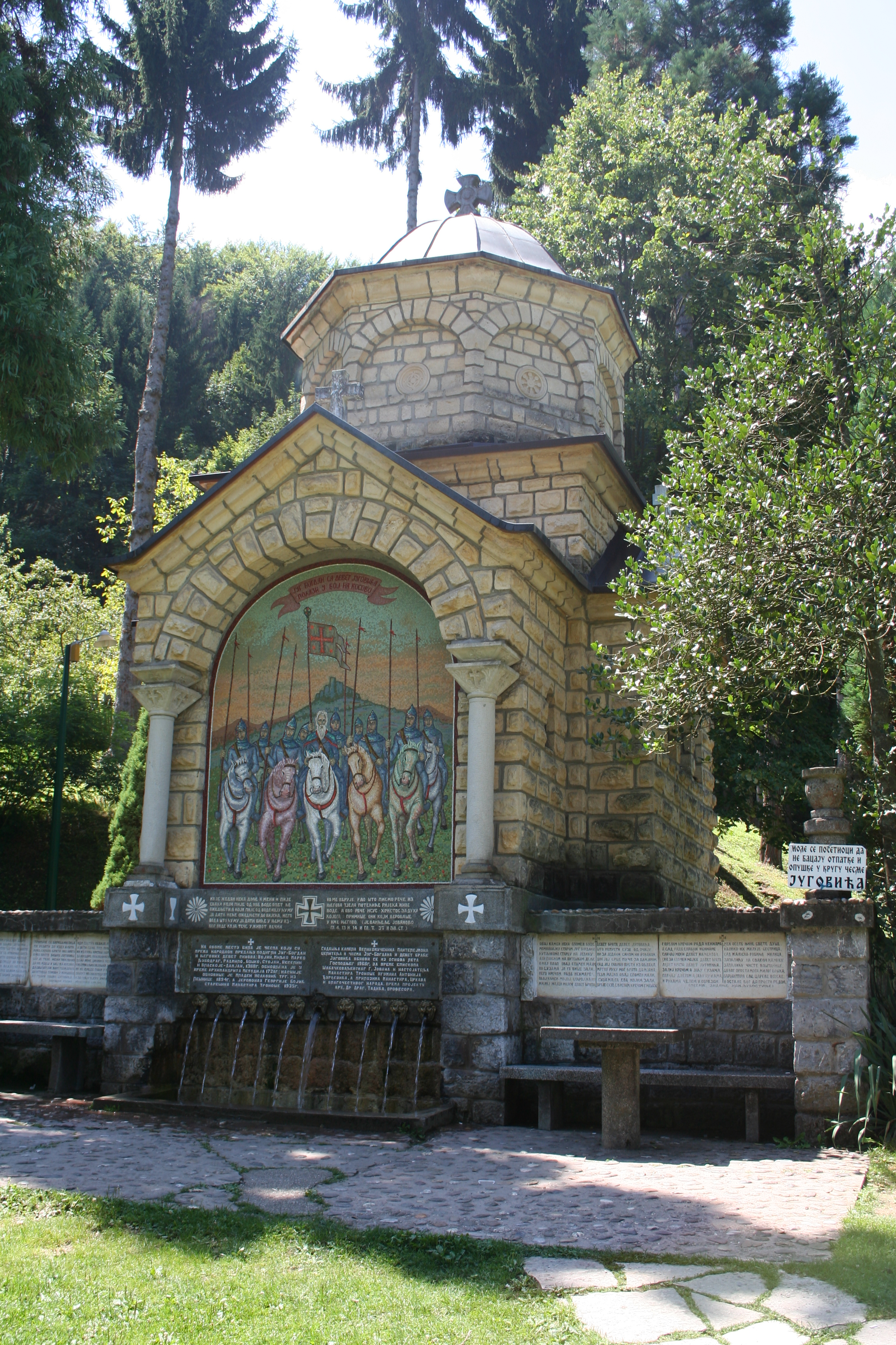 Kapela Sv. Pantelejmona sa česmom devet Jugovića